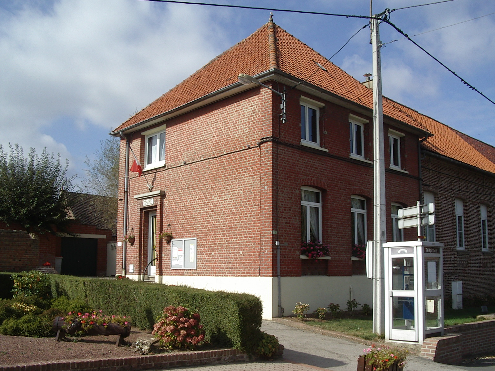 Ancienne mairie de Berthen (59, Nord)